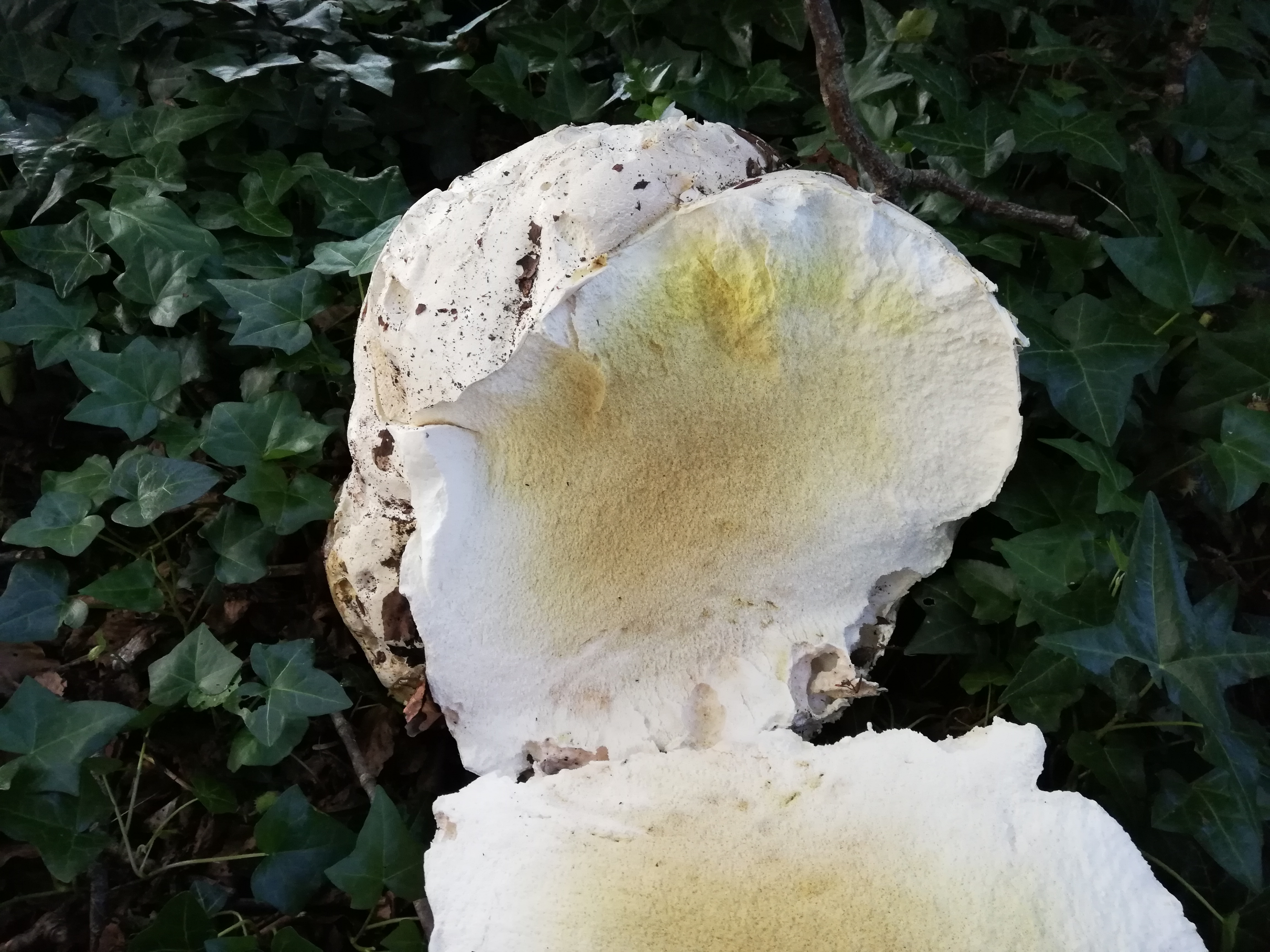 Starszy owocnik z żółknącą już glebą, nienadający się w takim stanie do spożycia.